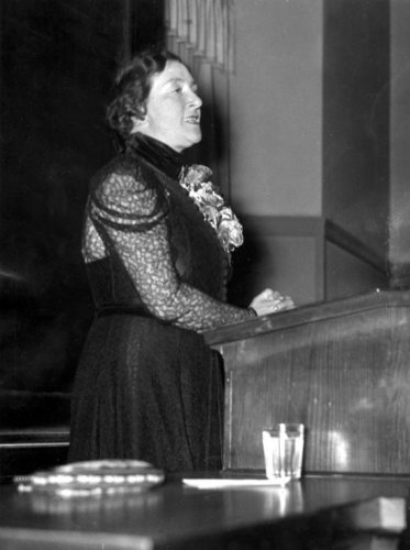 Jo van Ammers-Küller tijdens een presentatie in de Universiteit van Berlijn.